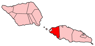 Localisation du district de A'ana (en rouge) à l'intérieur des Samoa Map of Samoa showing A'Ana district. Made by User:Golbez.